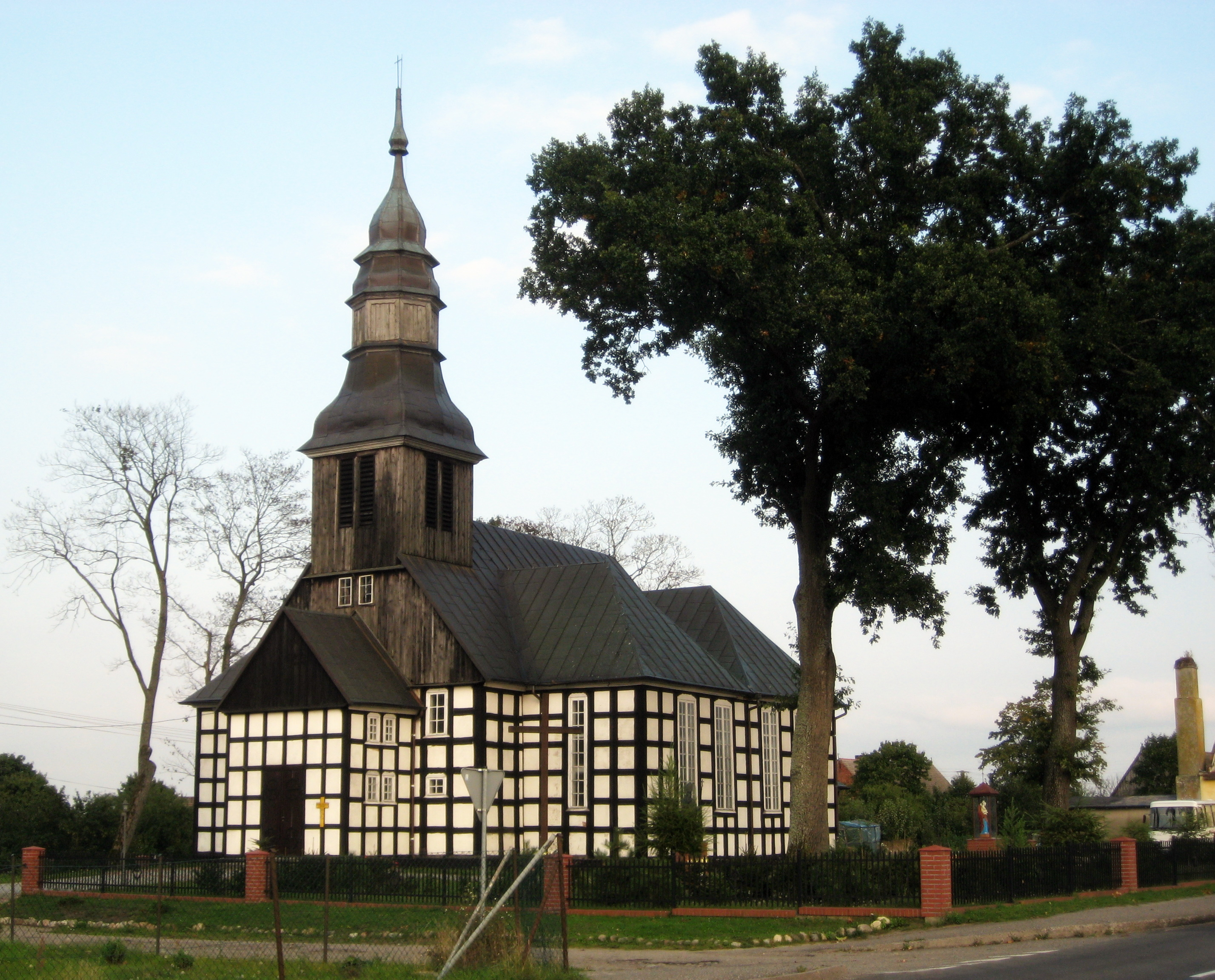 Brzezie - Kościół p.w. św. Wawrzyńca z drewnianą wieżą (zabytek nr rejestr. A-62).